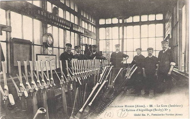 Cabine d'Aiguillage de la Gare d'Hirson. Caption: Collection Hirson (Aisne). - 26. - La Gare (Intérieur) La Cabine d'Aiguillage (Saxby) N°3 Cliché Em. P., Fontaine-les-Vervins (Aisne)